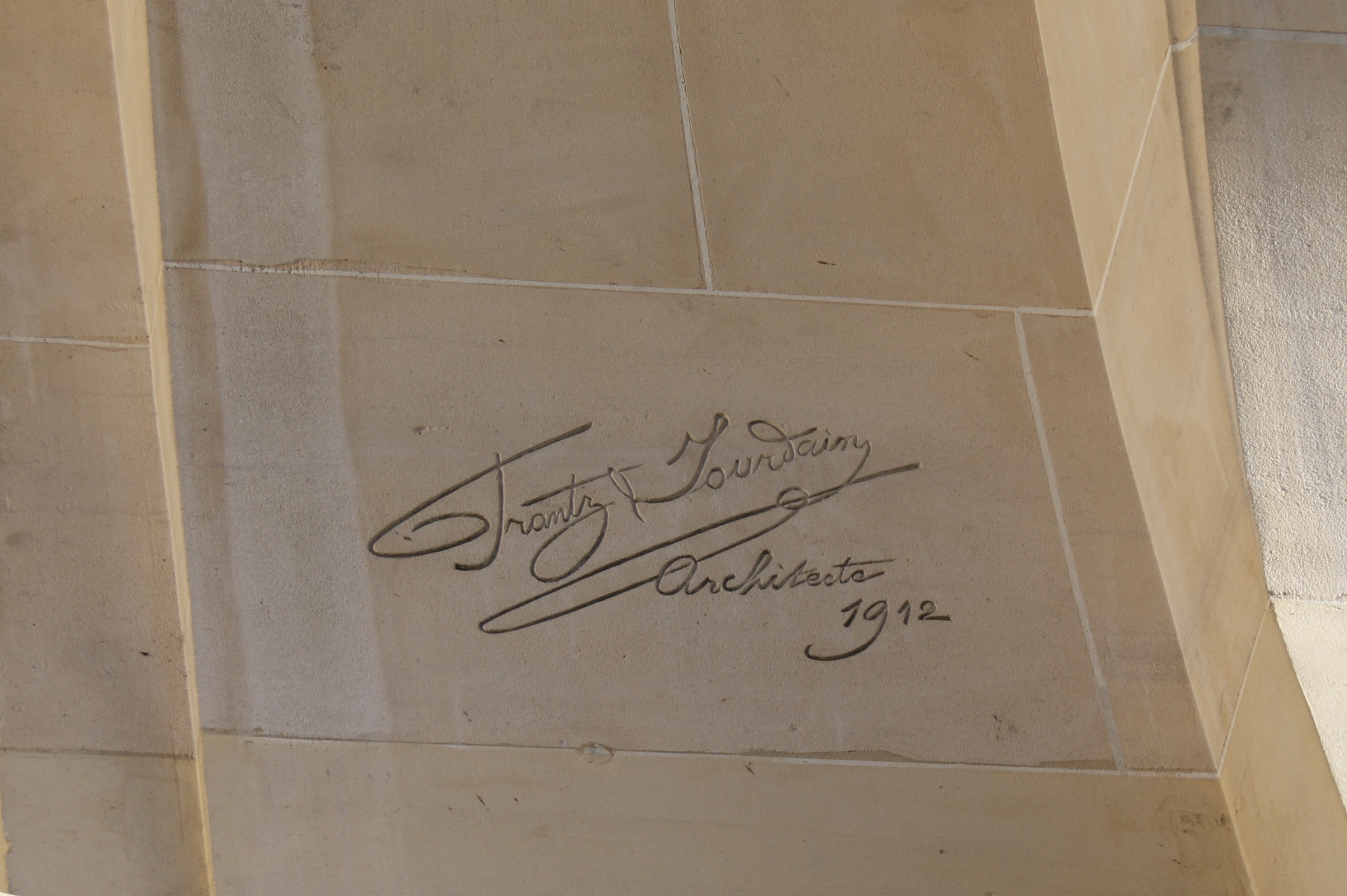 Ehemaliges Gebäude von La Semeuse de Paris, 16, rue du Louvre/rue Bailleul im 1. Arrondissement von Paris, 1912 von dem Architekten Frantz Jourdain für Ernest Cognacq errichtet, Signatur: Frantz Jourdain Architecte 1912